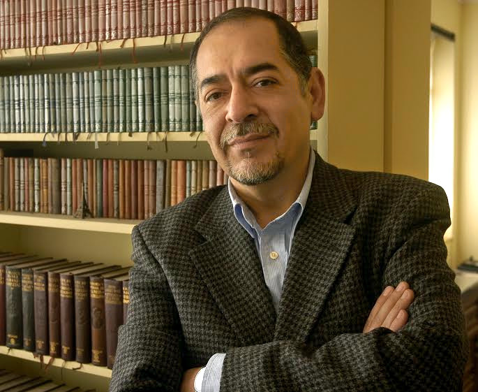 El escritor chileno Carlos Iturra